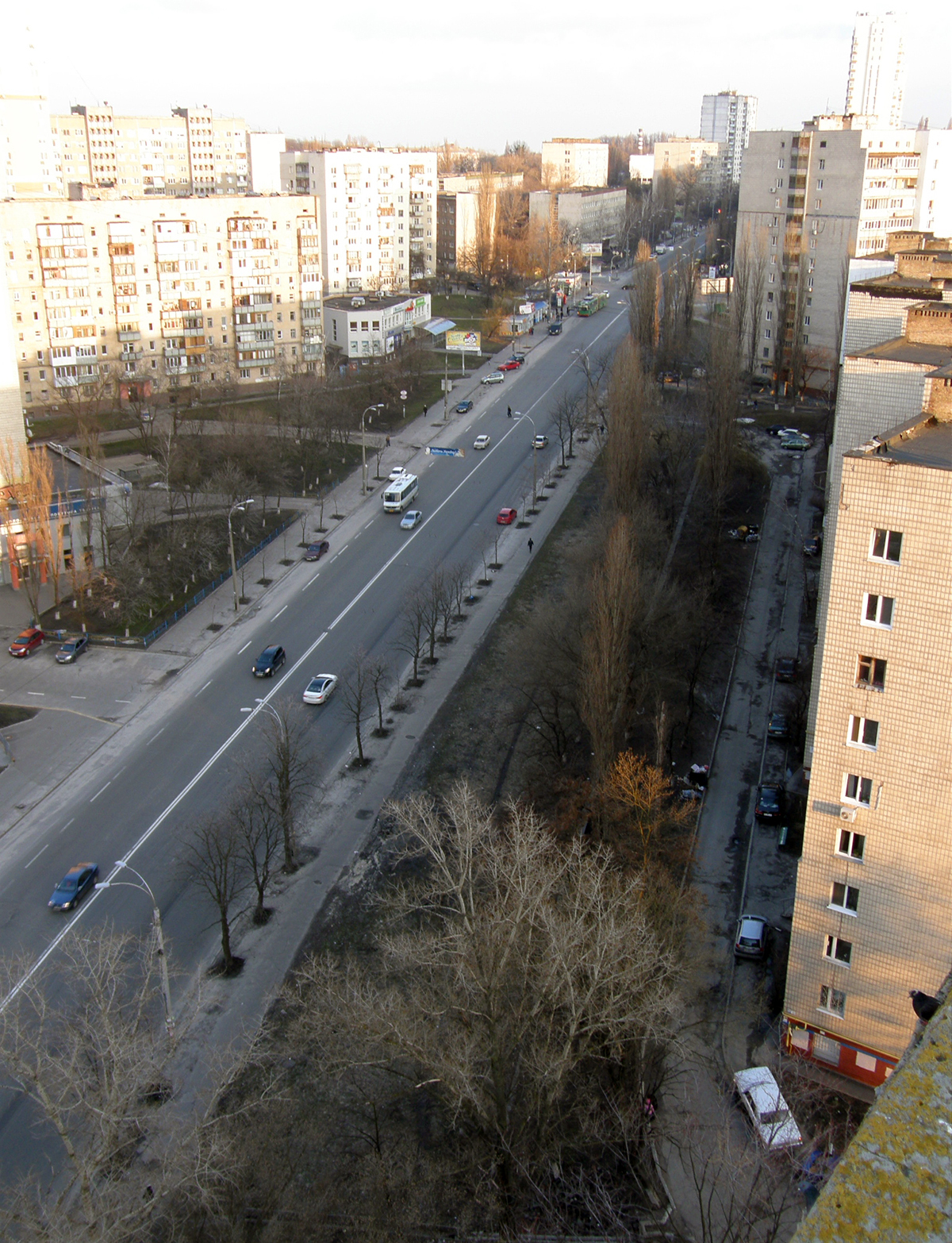 просп. Науки вверх от Сапёрно-Слободской ул.